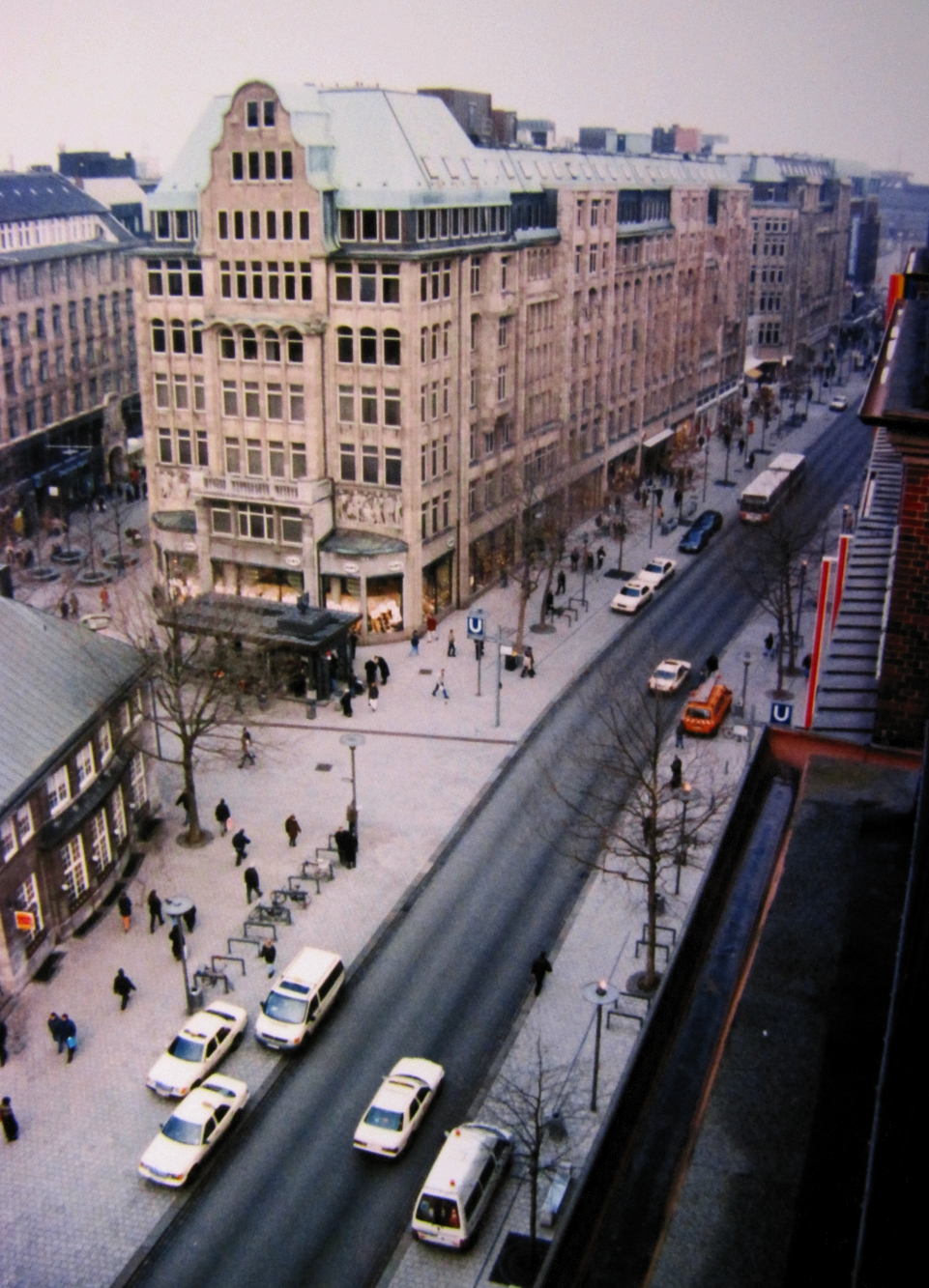 Mönckebergstraße vom Rappolthaus aus (1998)